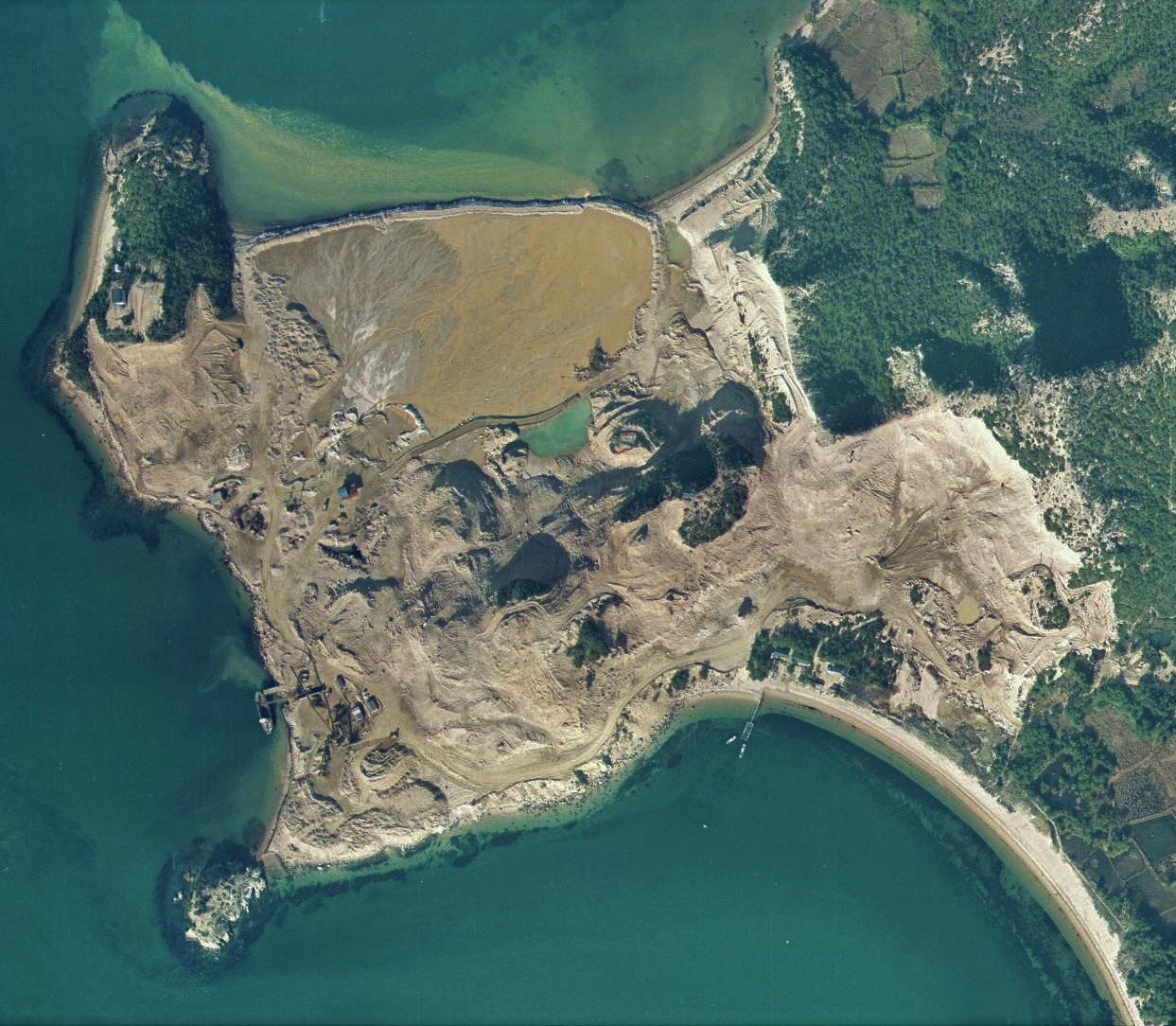 香川県豊島の産廃問題の現場。1974年の撮影。まだ廃棄物処分場は申請中であり、認可されていない。1978年に処分場が認可され、産廃の違法な持ち込みが開始される。